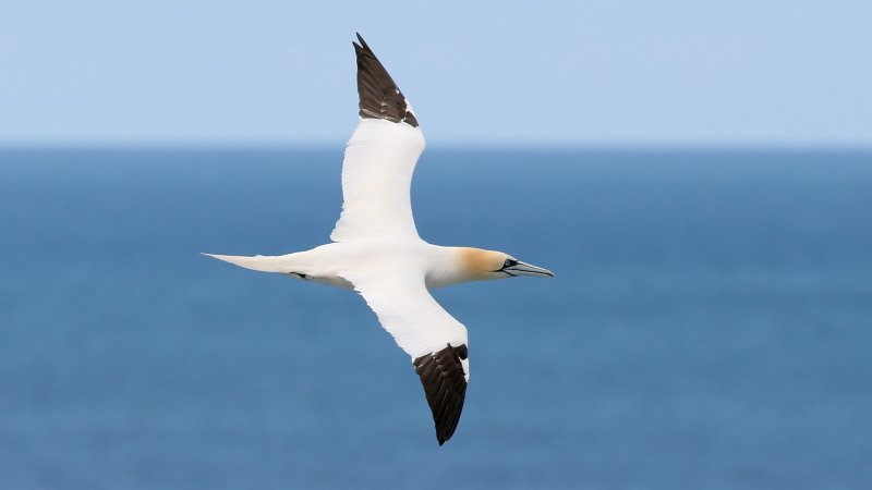 Gannet (Morus bassanus)